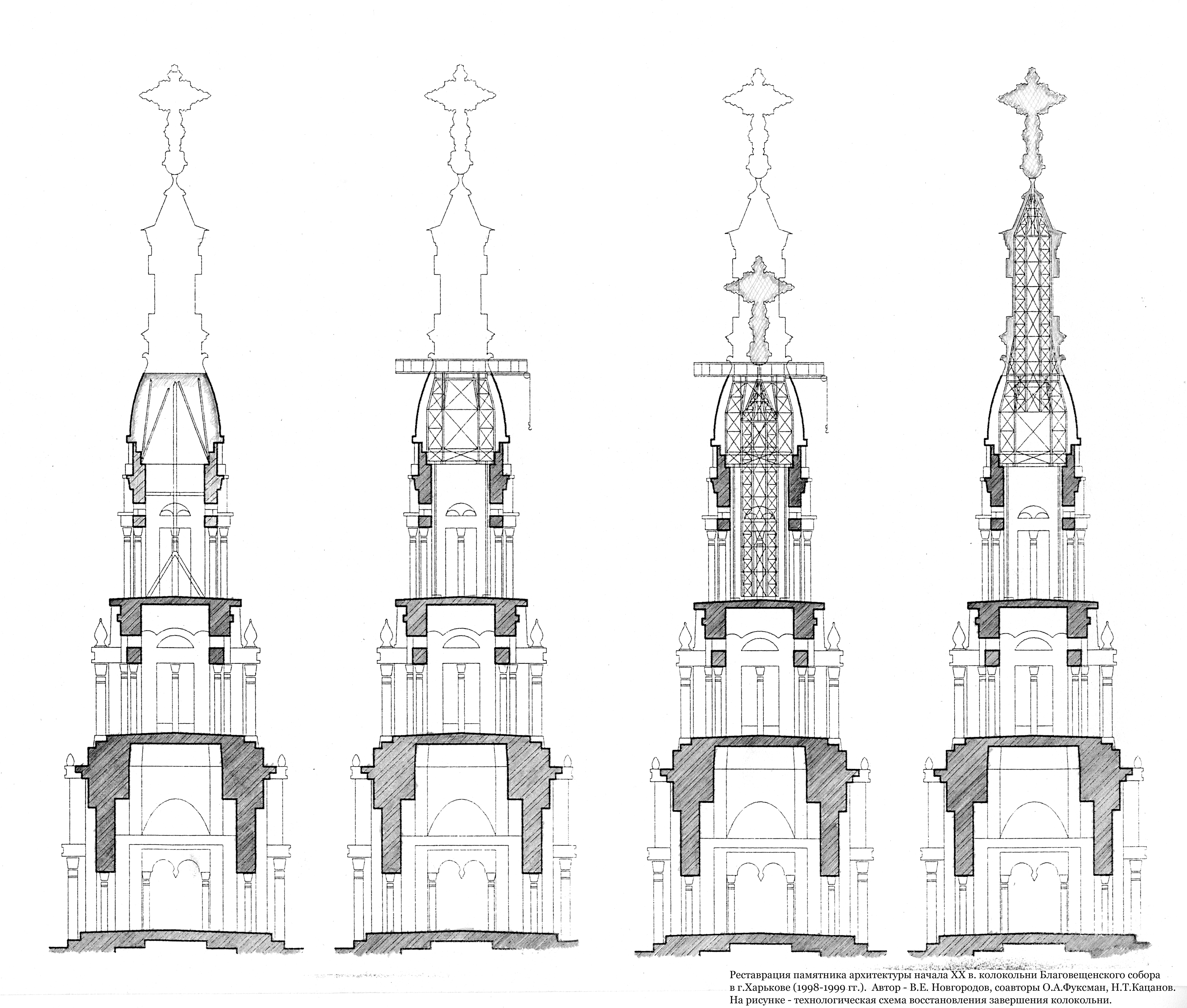 Схема реконструкции колокольни Благовещенского собора в Харькове.